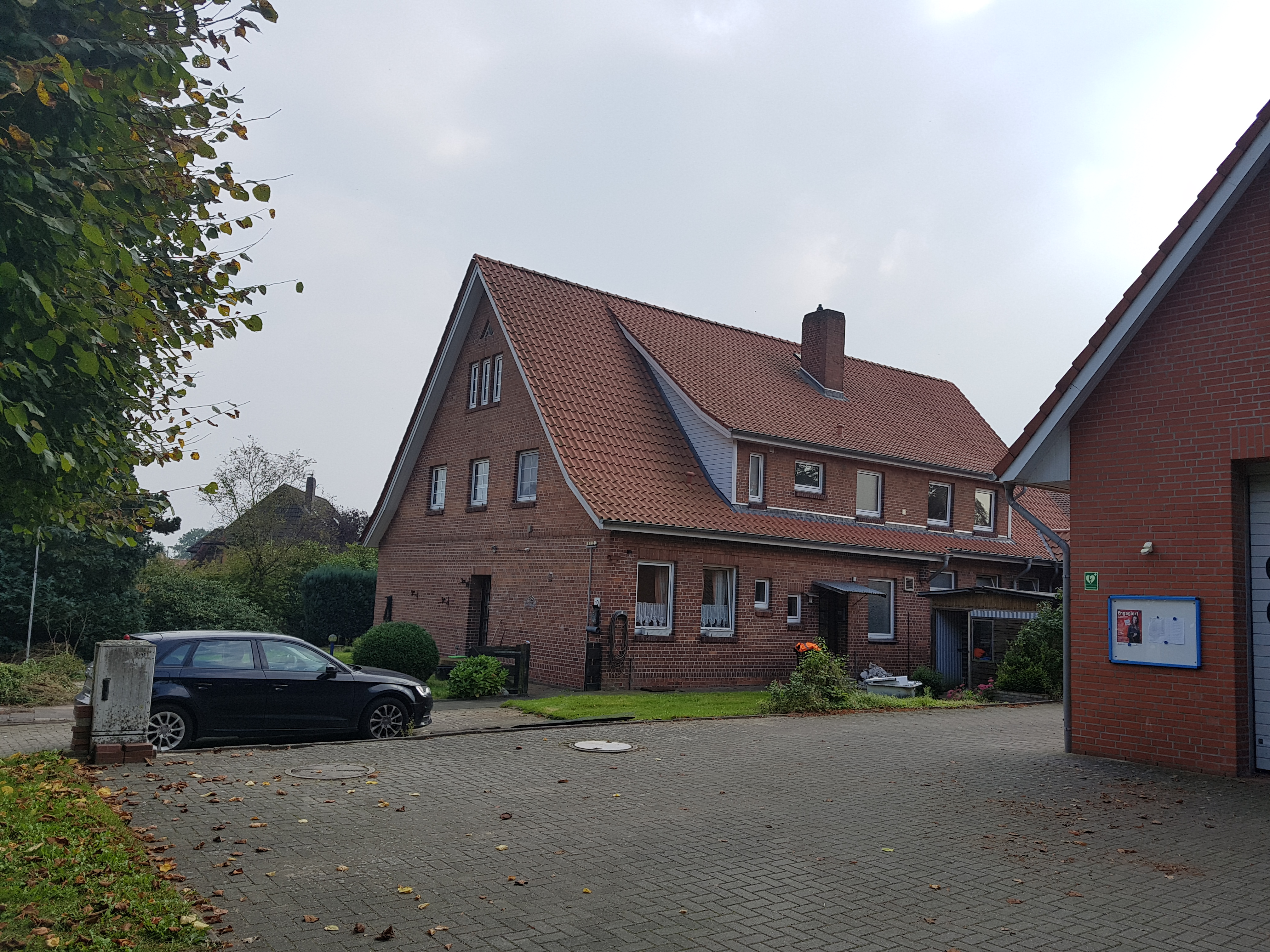 De ole School in Hollen